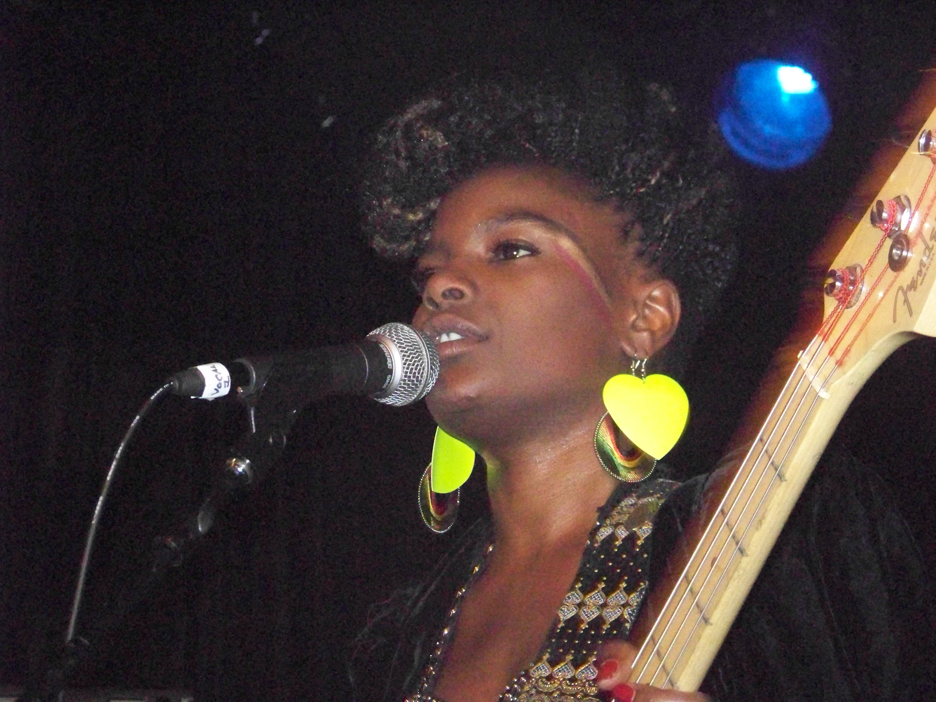 Singer Shingai Shoniwa performing in Atlanta, Georgia.